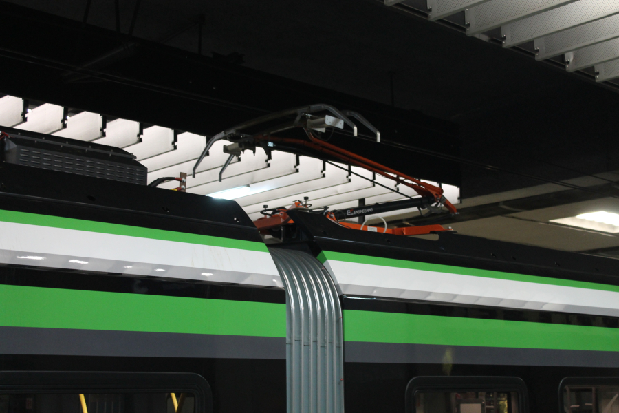 Pantograf elektrycznego zespołu trakcyjnego Newag Impuls 45WE-004.